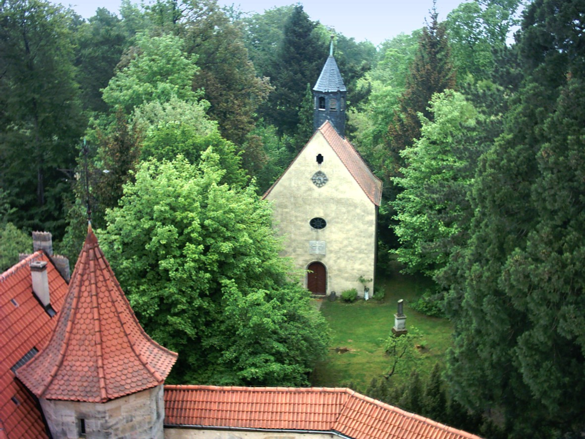 Schloss Hohenstein bei Coburg, Schlosskirche von 1709 Quelle: selbst fotografiert Fotograf/Zeichner: presse03 Datum: 14.05.2006